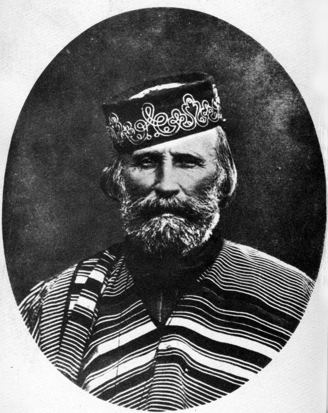 Giuseppe Garibaldi